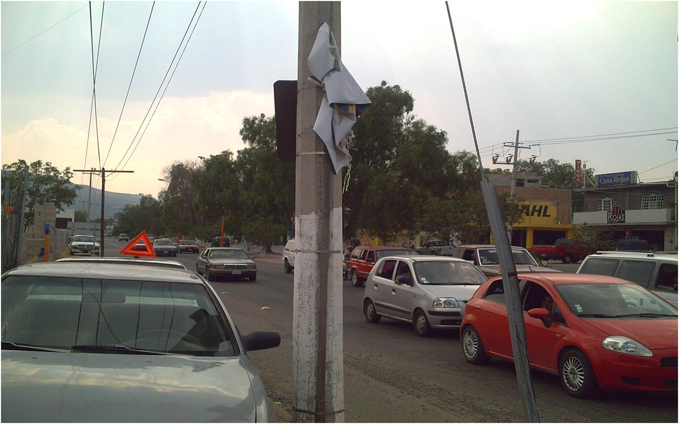 Bulevar Juventino Rosas del lado de Purísima de Bustos